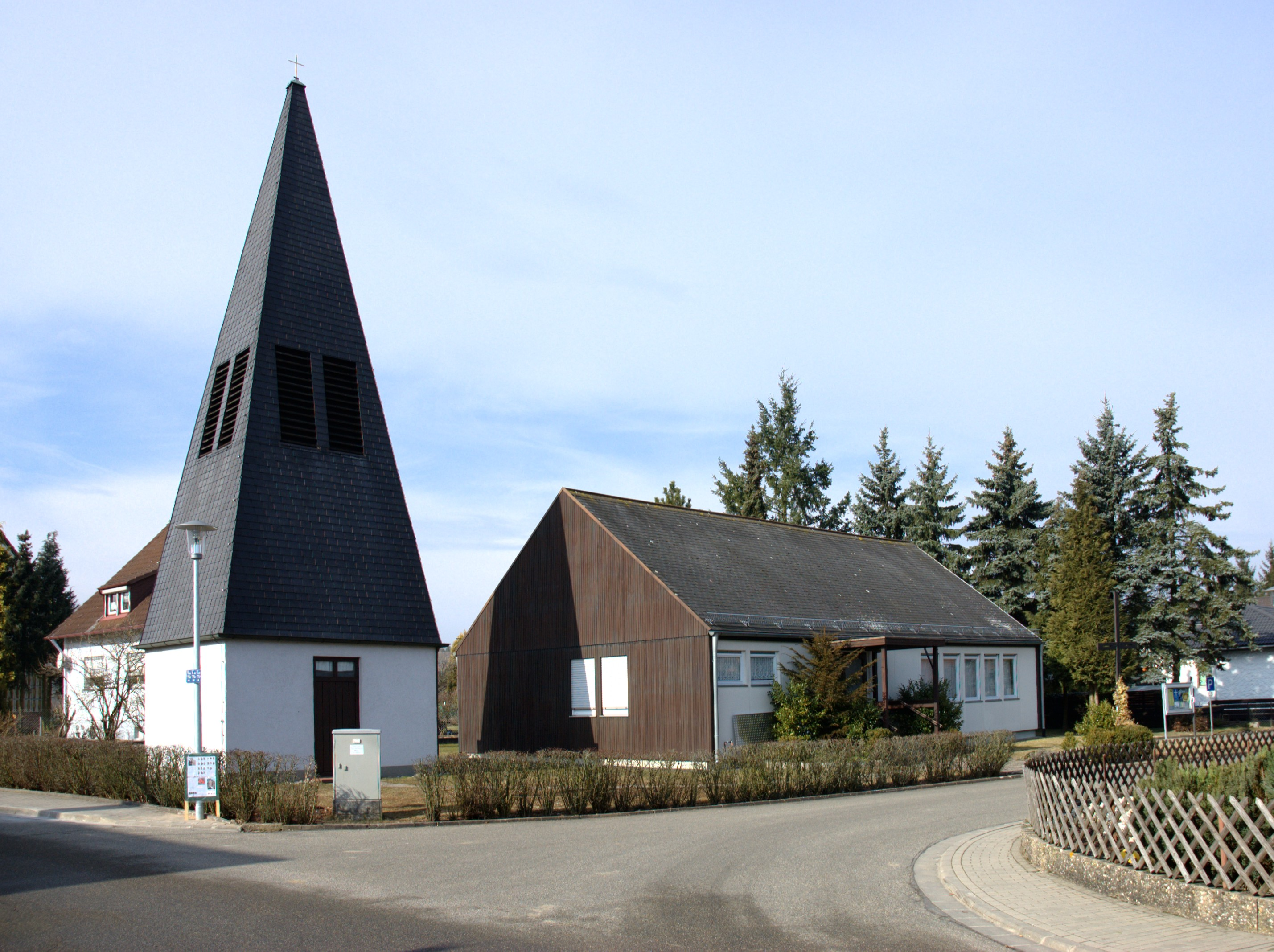 Kirche Wicklesgreuth (wird sowohl von der evangelischen als auch katholischen Kirchengemeinde benutzt)